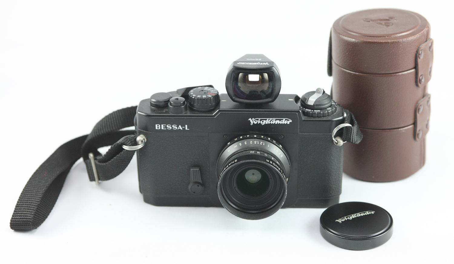 0433 Voightlander Bessa L with 25mm Skopar lens